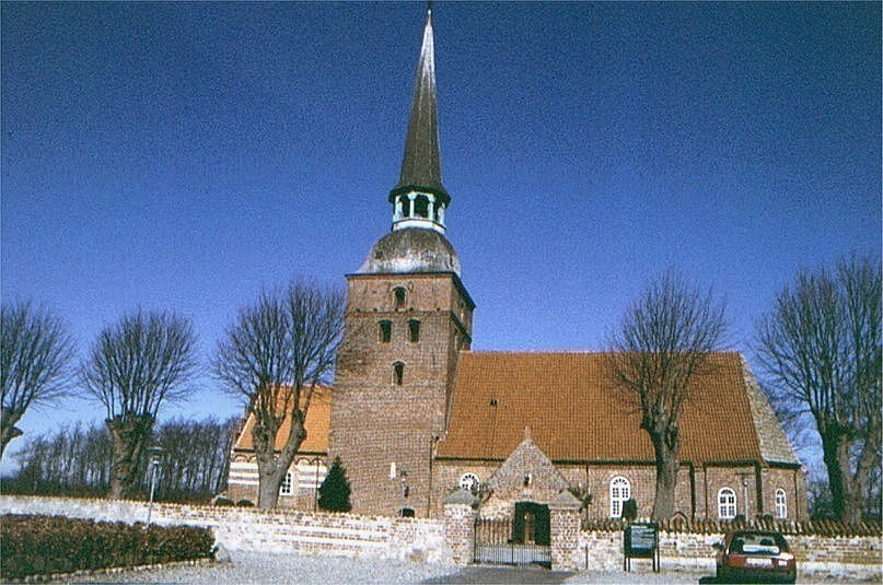 Kippinge Kirke i Danmark. Kippinge kirke